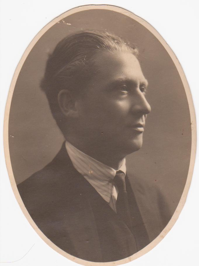 Photo de Ferdinando Bosso